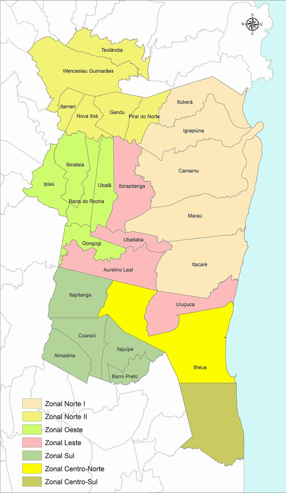 Mapa dos Zonais da Diocese de Ilhéus